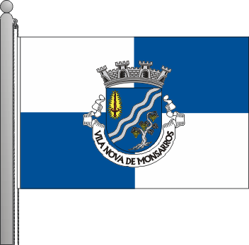 imagem